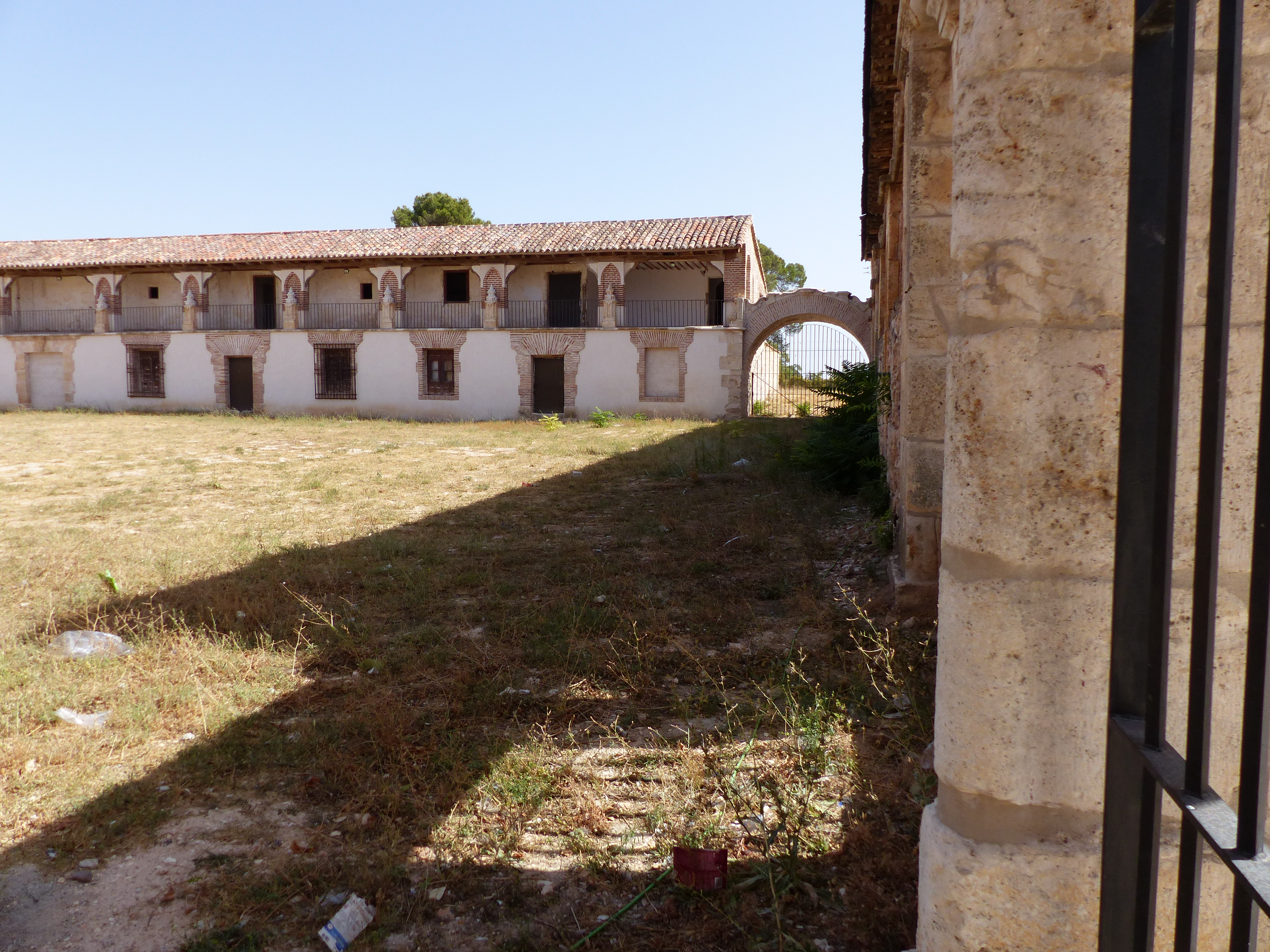 Palacio de Goyeneche, Nuevo Baztán, Madrid